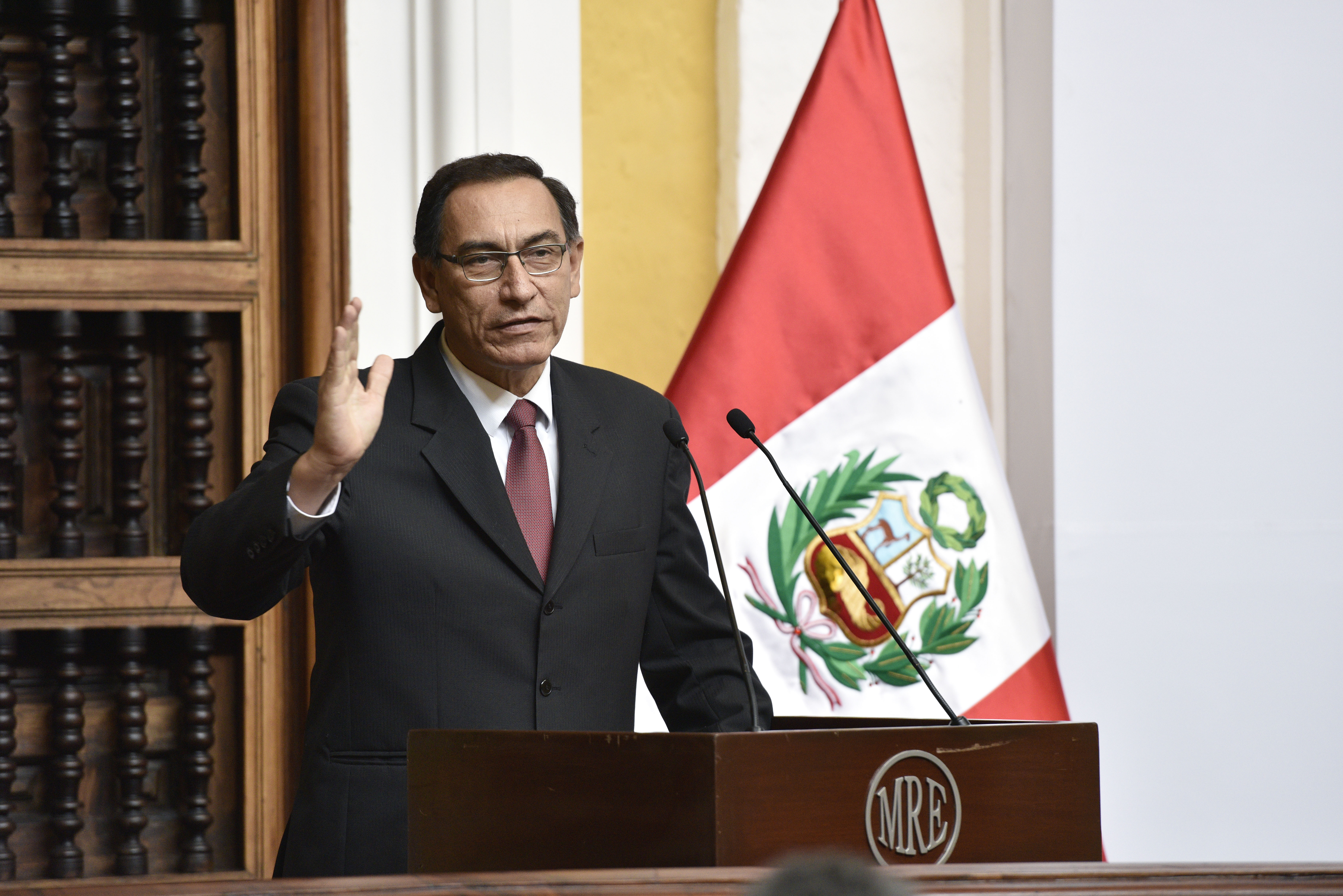 El Vicepresidente de la República, Martín Vizcarra y el Ministro de Relaciones Exteriores, Embajador Ricardo Luna clausuraron, en la sede del Palacio de Torre Tagle, la conferencia internacional “Construyendo Perú: El camino hacia la agenda 2030 para el Desarrollo Sostenible” que organizó la Cancillería junto a la Americas society/Council of the Americas (AS/COA)